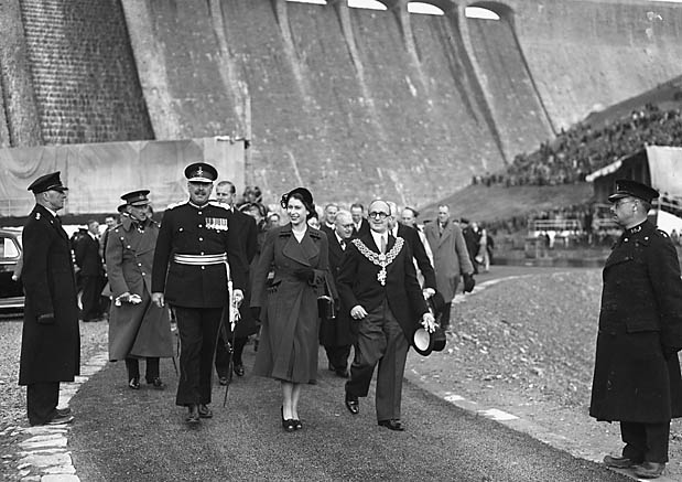 Teitl Cymraeg/Welsh title: Y Frenhines yn agor Argae Clearwen Ffotograffydd/Photographer: Geoff Charles (1909-2002) Dyddiad/Date: 1/8/1955 Cyfrwng/Medium: Negydd ffilm / Film negative Cyfeiriad/Reference: (gch12019) Rhif cofnod / Record no.: 3369669 Rhagor o wybodaeth am gasgliad Geoff Charles yn Llyfrgell Genedlaethol Cymru More information about the Geoff Charles Collection at the National Library of Wales Mae ffotograffau Geoff Charles hefyd yn rhan o Broject Europeana Libraries Geoff Charles' photographs also form part of the Europeana Libraries Project